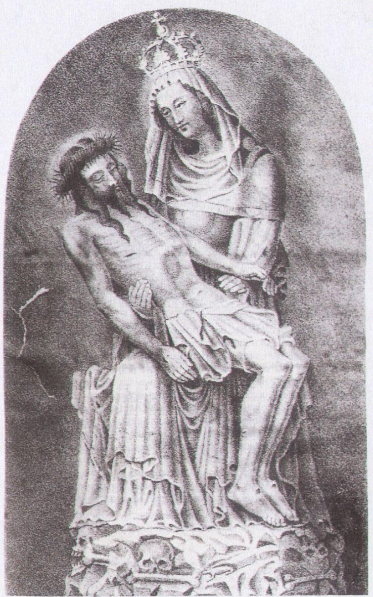 Wahre Abbildung der schmerzhaften Muttergottes in der Kapelle zu Kalk, in der Deutzer Pfarrei